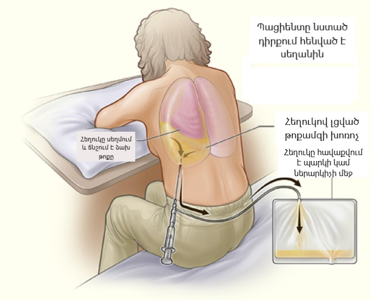 Պատկերված է թորակոցենտեզի գործընթացը, պացիենտը նստած դիրքում է՝ հենված սեղանին։ Թոքամզային խոռոչից դրենավորվող հեղուկը լցվում է պարկի մեջ։